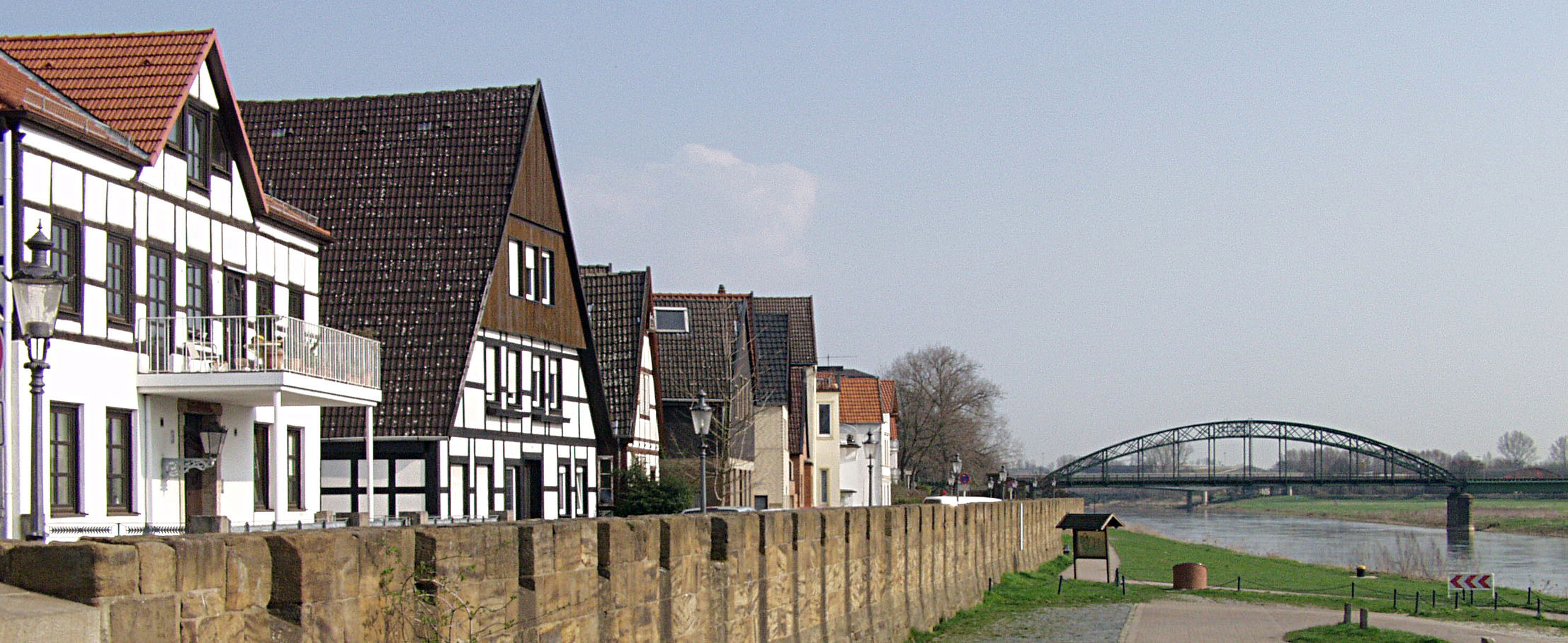 Blick auf die Mindener Fischerstadt am linken Weserufer in Nordrhein-Westfalen. Die vordere Brücke über die Weser ist die Eisenbahnbrücke der Strecke Bahnstrecke Minden–Uchte, die hintere ist die Nordbrücke über die die Ringstraße über den Weserstrom geführt wird. Die Mauer (Fischerstadtmauer) vor den Häusern dient sowohl dem Hochwasserschutz als auch (vor der Erniedrigung) der militärischen Sicherung im Komplex der Festungsbauwerke der preußischen Festung Minden. Weiterführendes auf dieser Website. Unten am Weserufer eine Station des Planetenwegs.